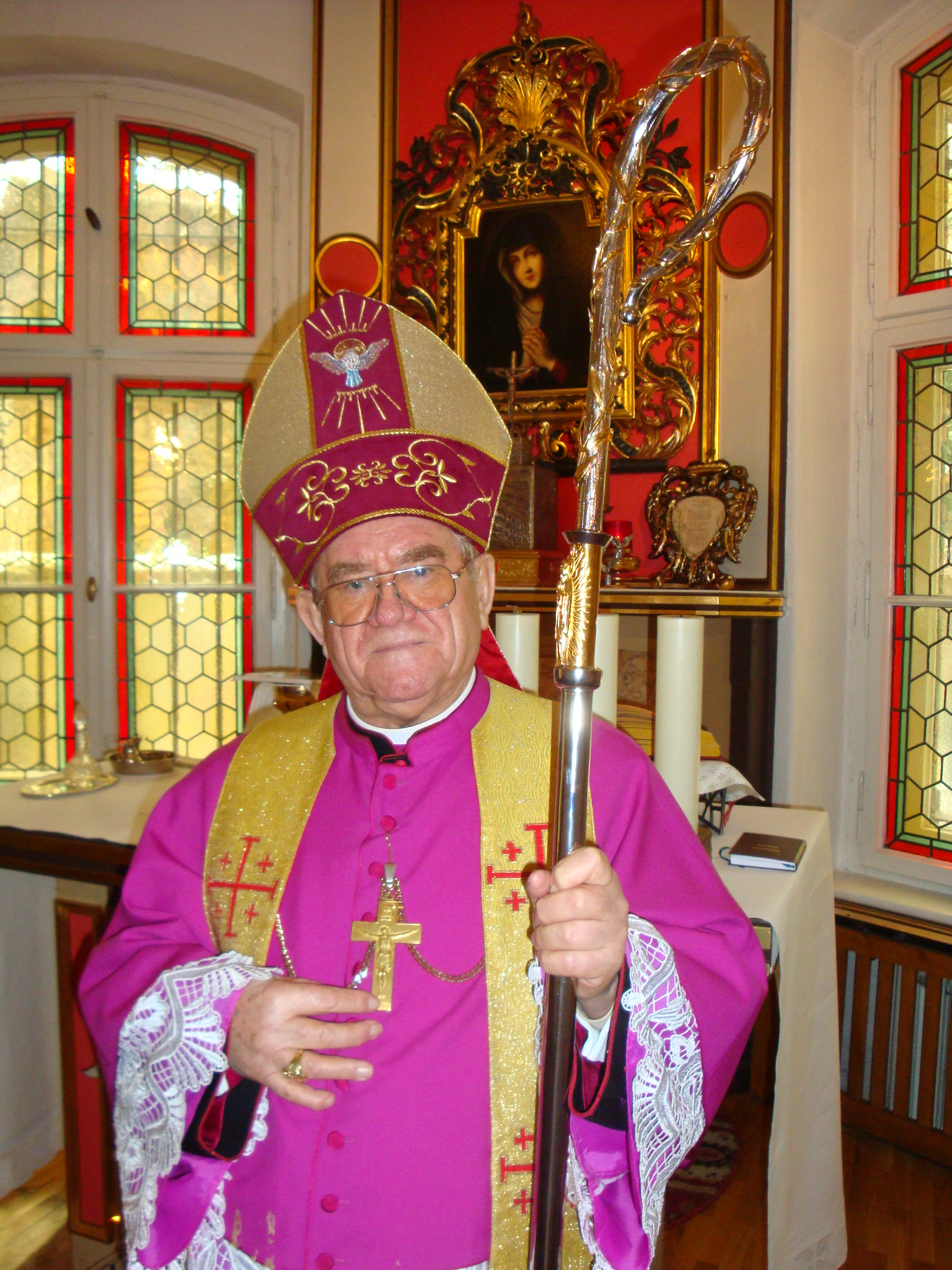 Biskup Józef Pazdur